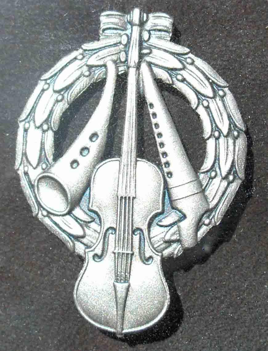 Silver Zorn Badge